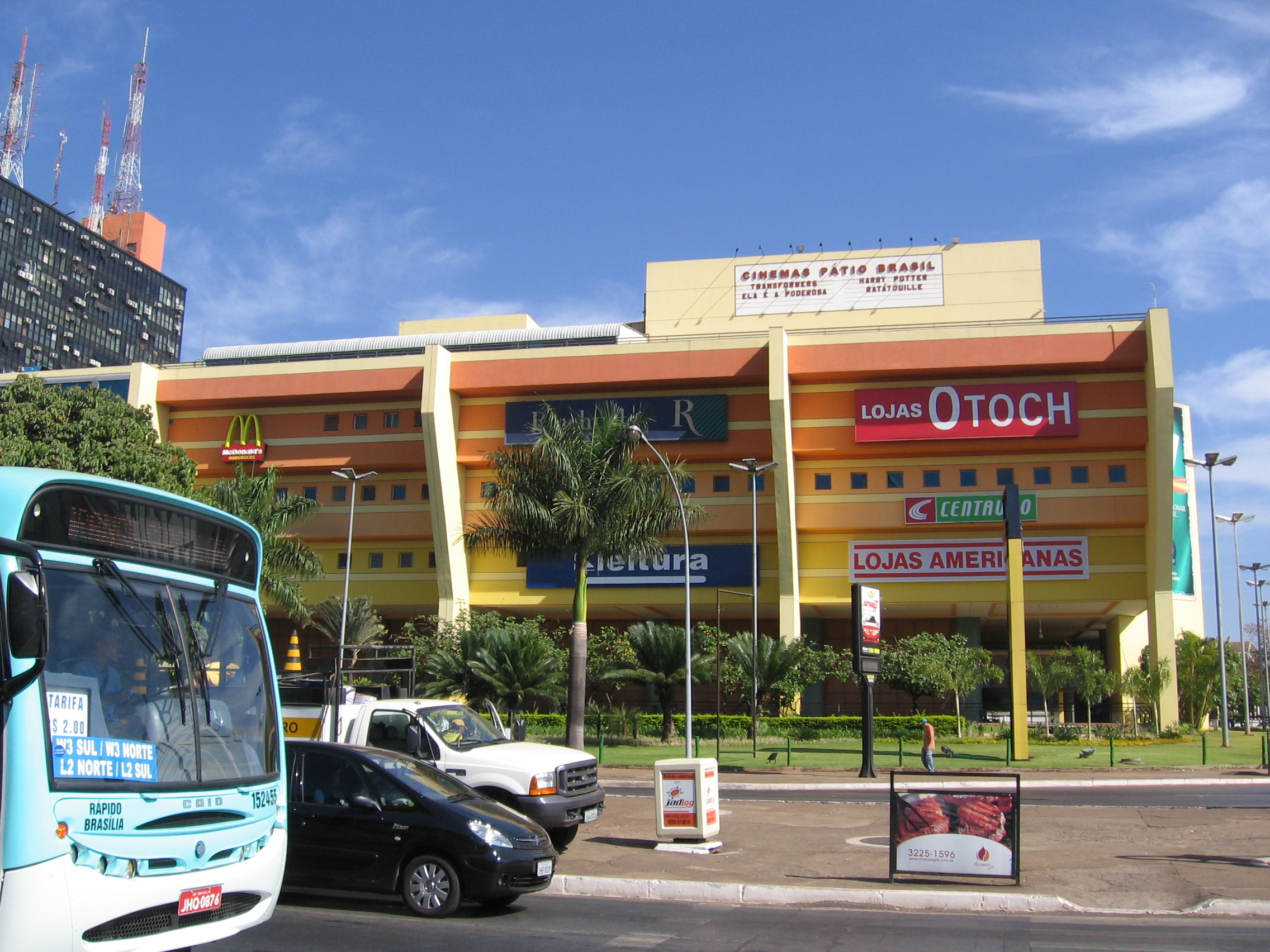 Pátio Brasil